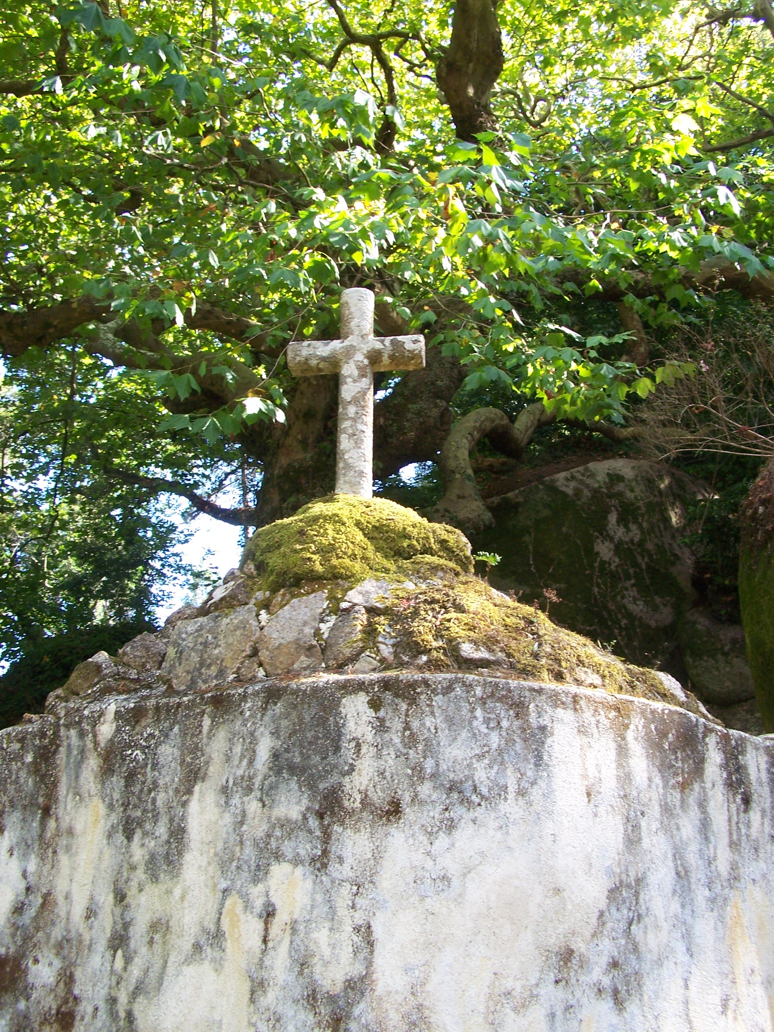 Convento dos Capuchos, Terreiro das Cruzes, Sintra, Portugal.